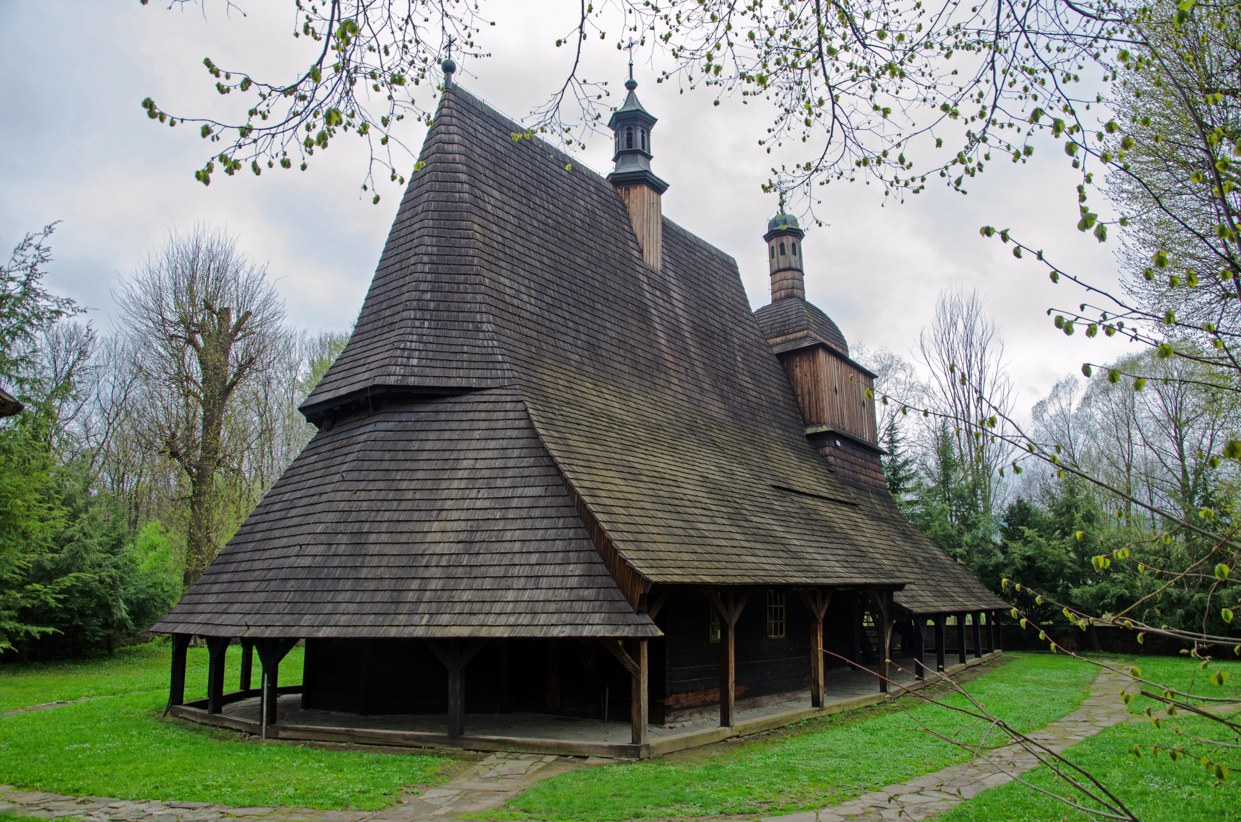 Sękowa, zespół kościoła fil. p.w. śś Jakuba i Filipa, XVI, XIX